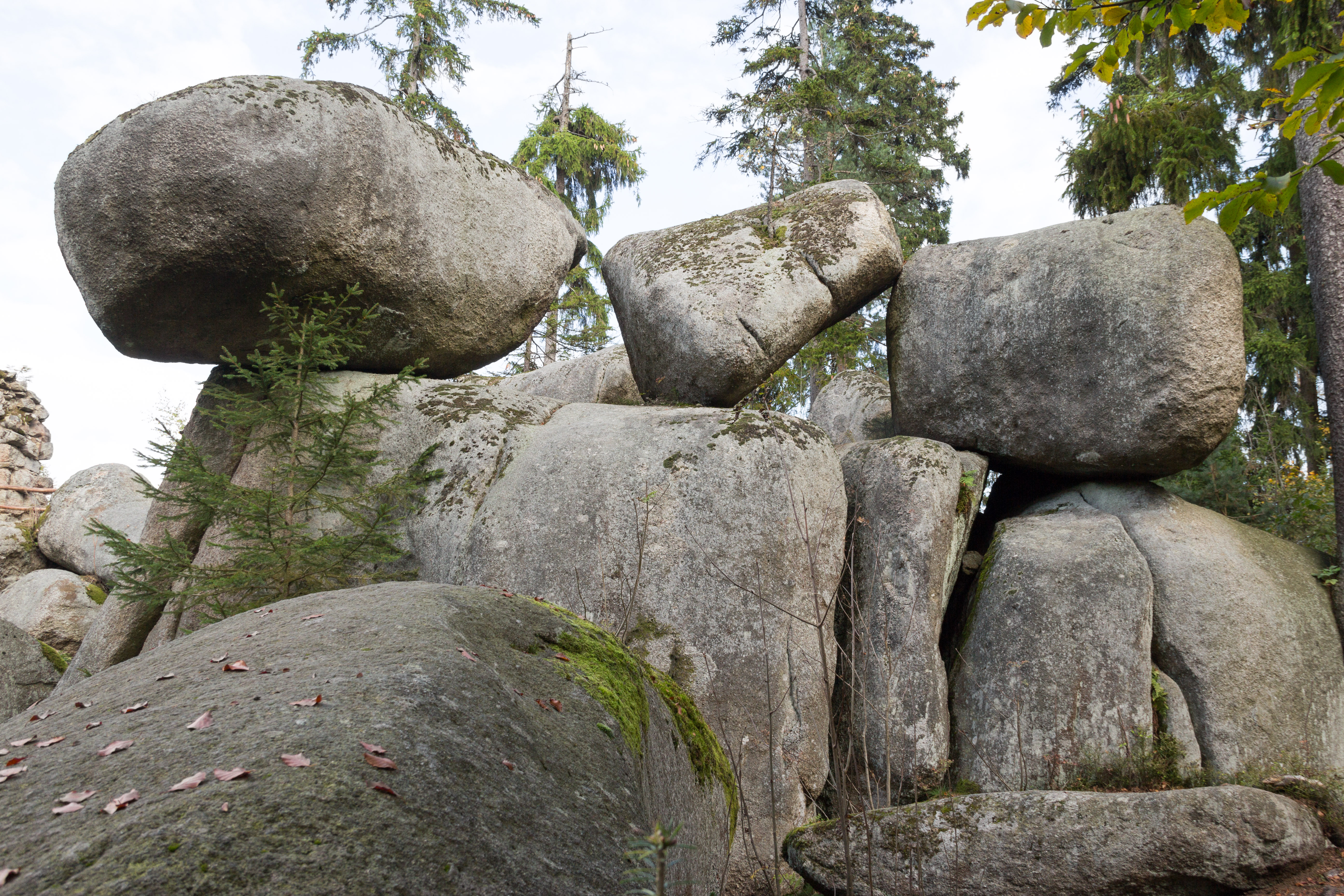 Luisenburg, Naturschutzgebiet, Geotop